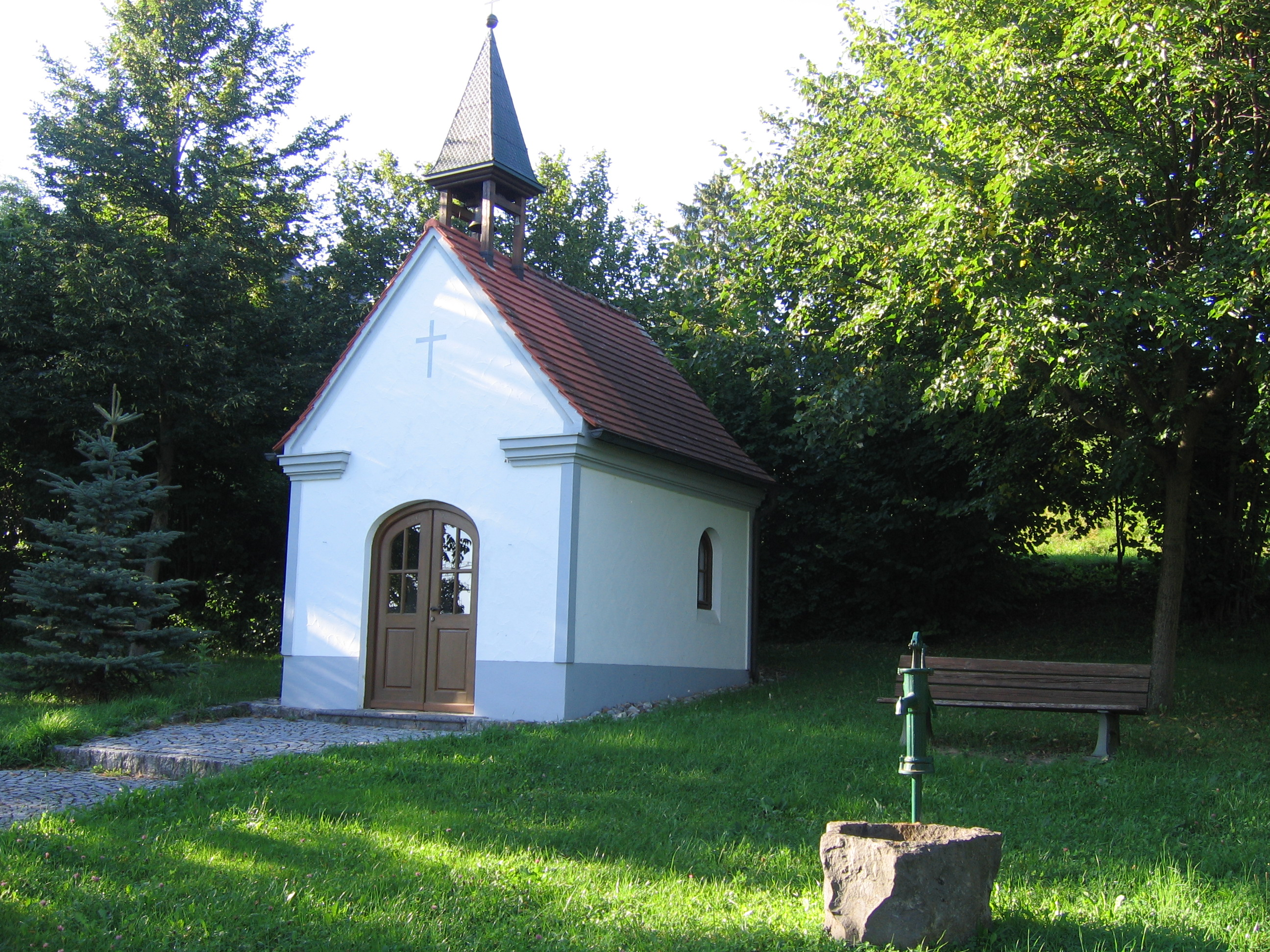 Die Josefsskapelle von Hesselohe erbaut von Berufsschülern